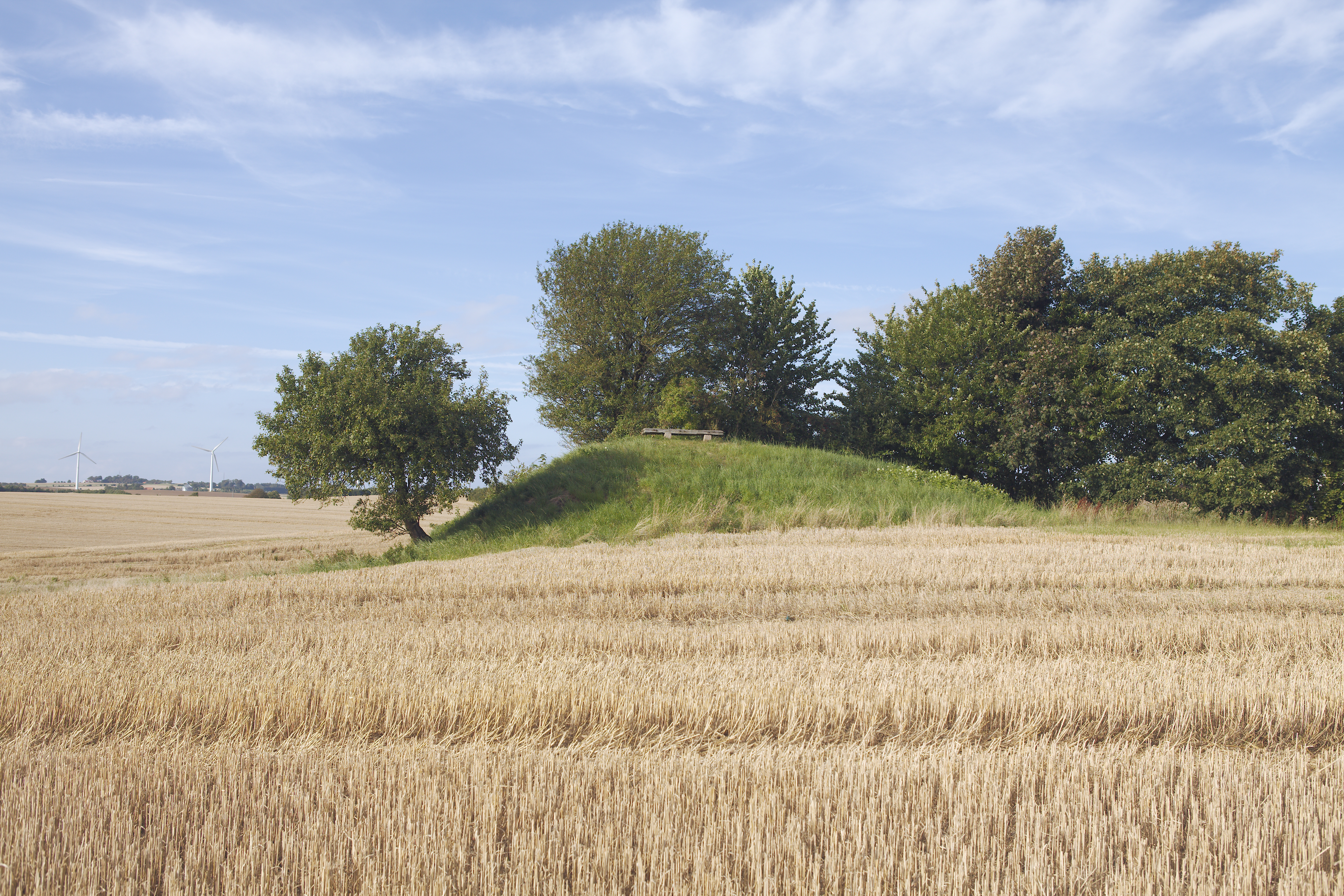 Hjortshøj (rundhøj)